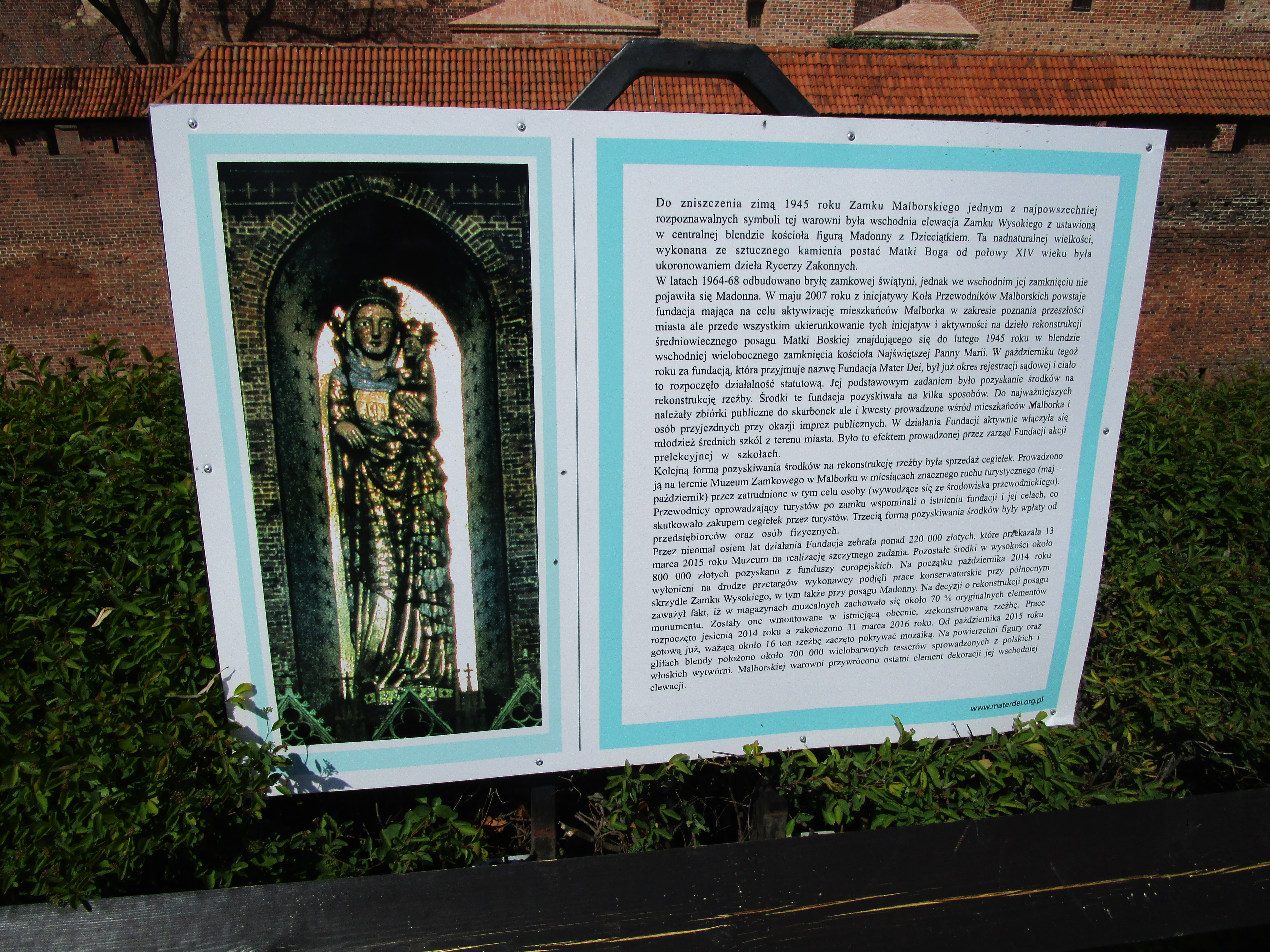 Infotafel zur Rekonstruktion der Marienfigur